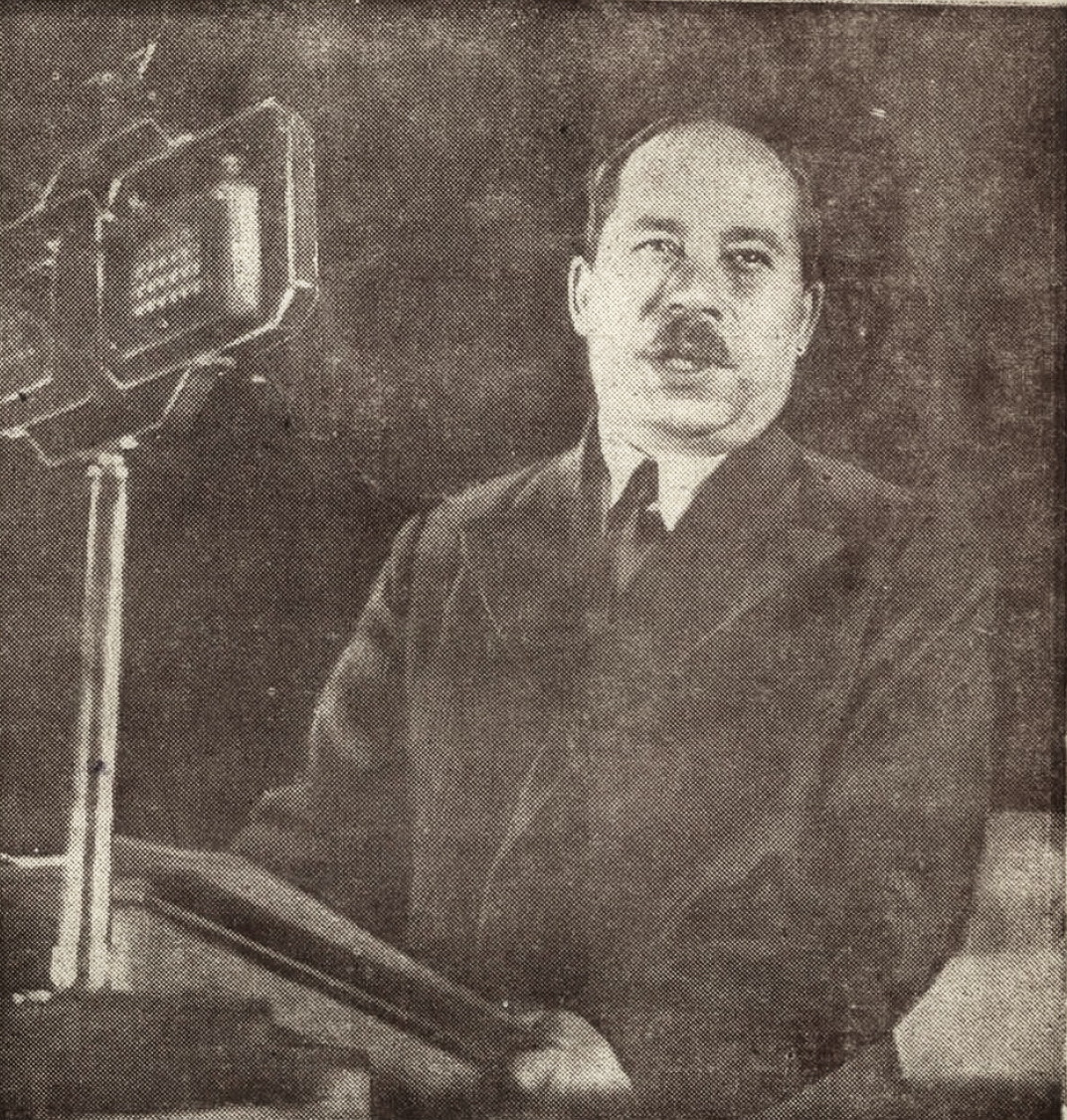 Старшыня ЦВК БССР А. Р. Чарвякоў на Надзвычайным XII З’ездзе Саветаў БССР робіць даклад аб праекце Канстытуцыі СССР, 1936.